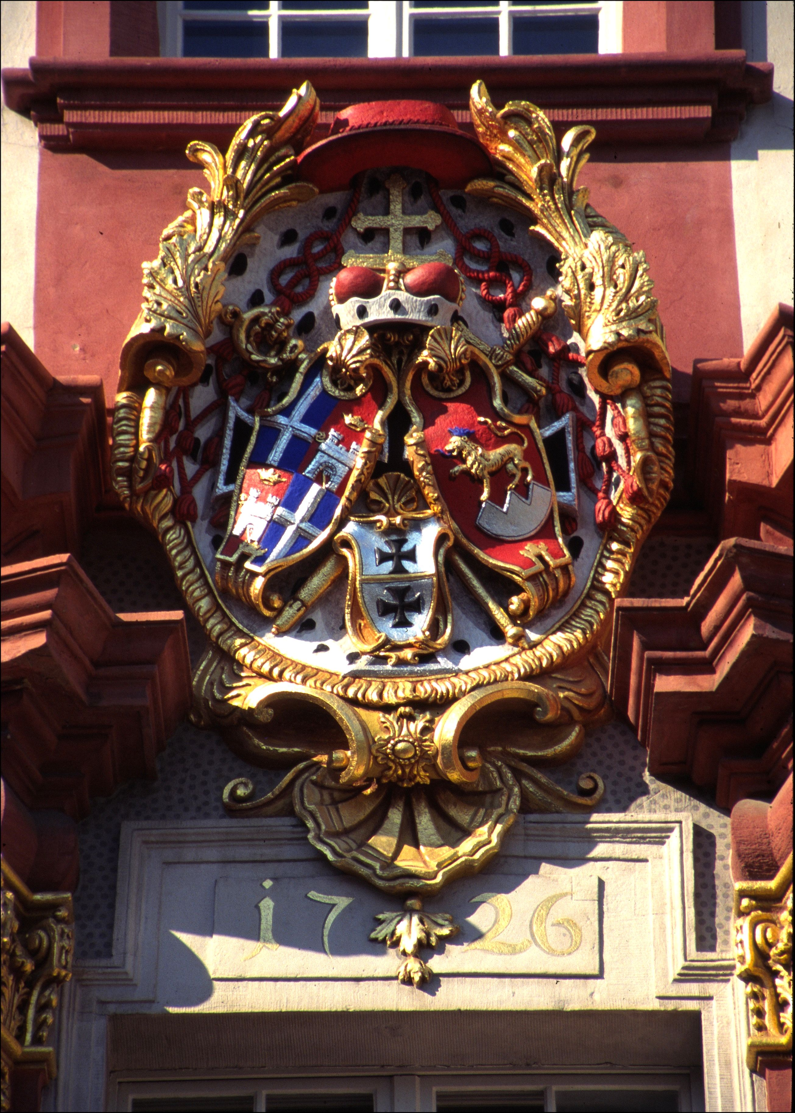 Bruchsal Schloss: Prunkwappen von Damian von Schönborn-Buchheim über dem Mittelrisalit des 'Kirchenflügels'